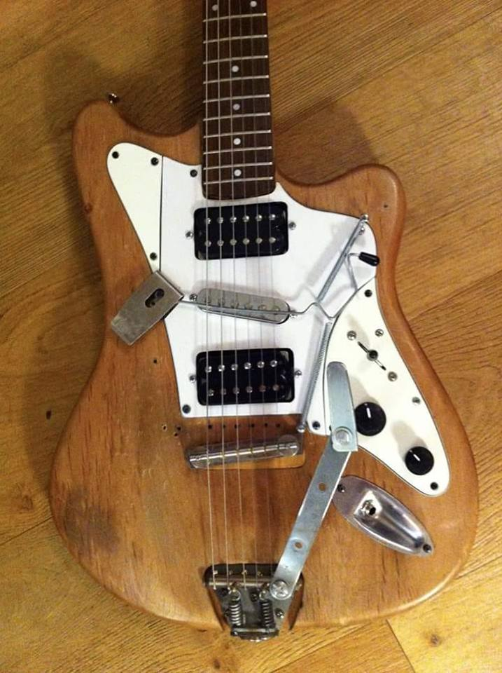 guitare augmentée utilisée par X Mussat , prototype par Patrick Kruger